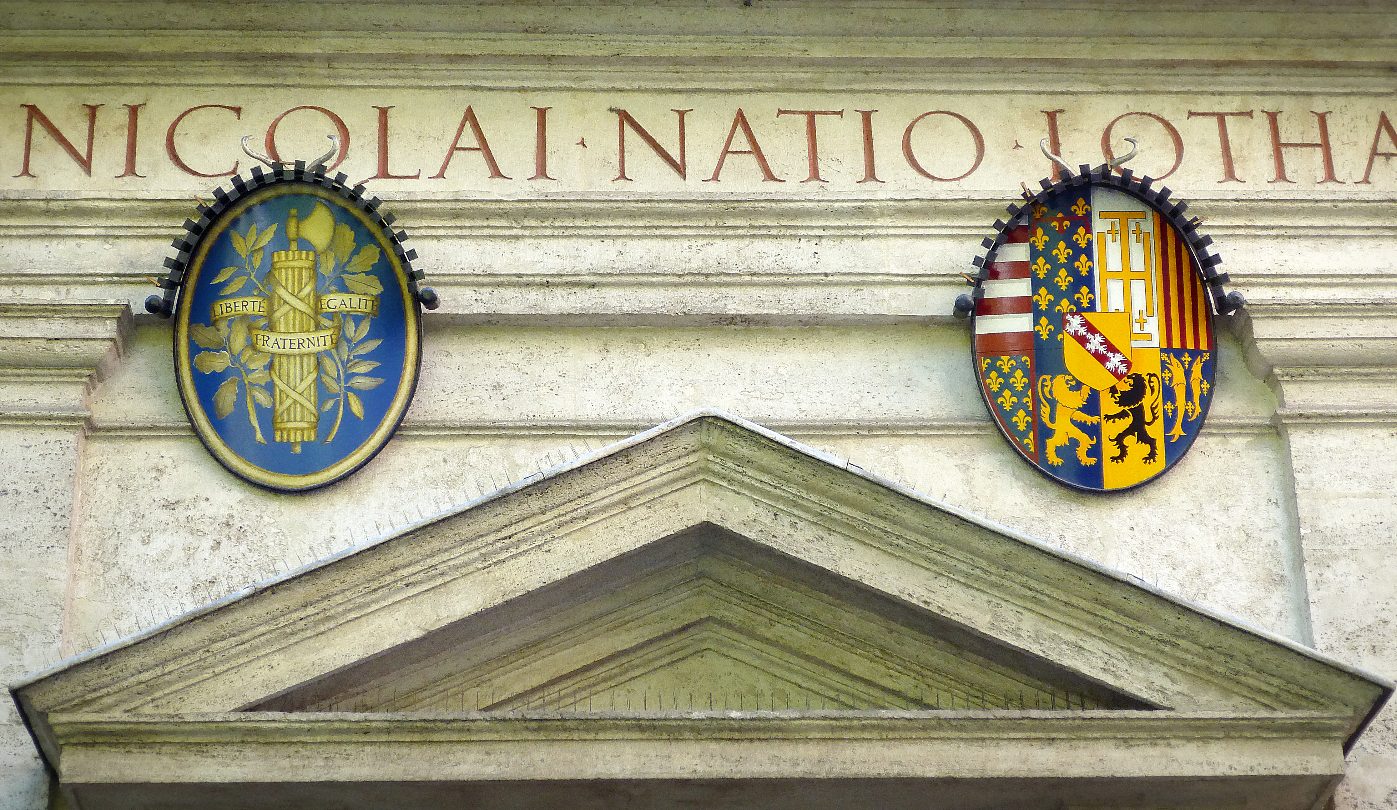 Roma, emblemi nazionali sulla facciata di S. Nicola dei Lorenesi: a sinistra il fascio della Repubblica, a destra quello del ducato di Lorena